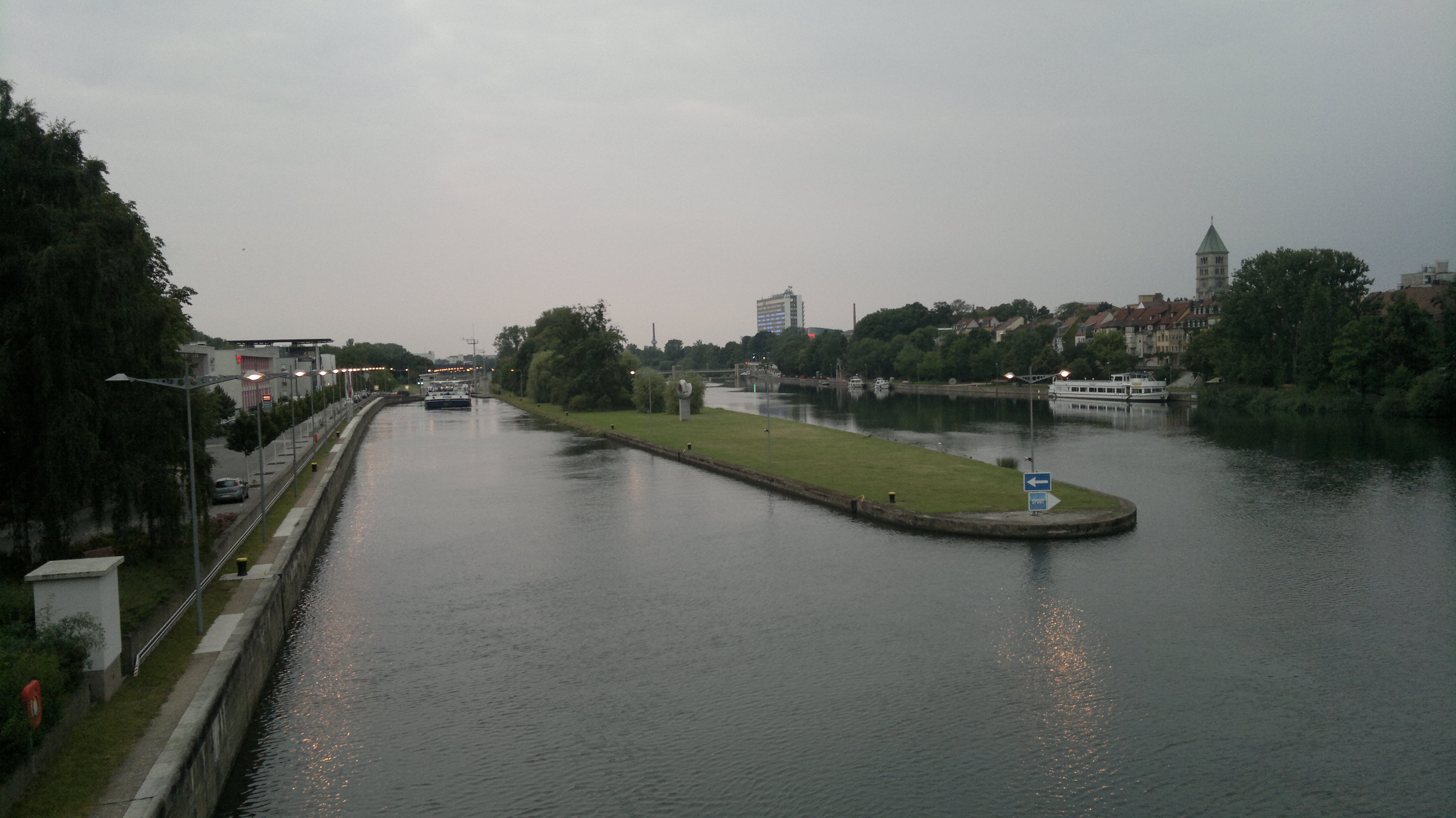 Schweinfurt, Germany